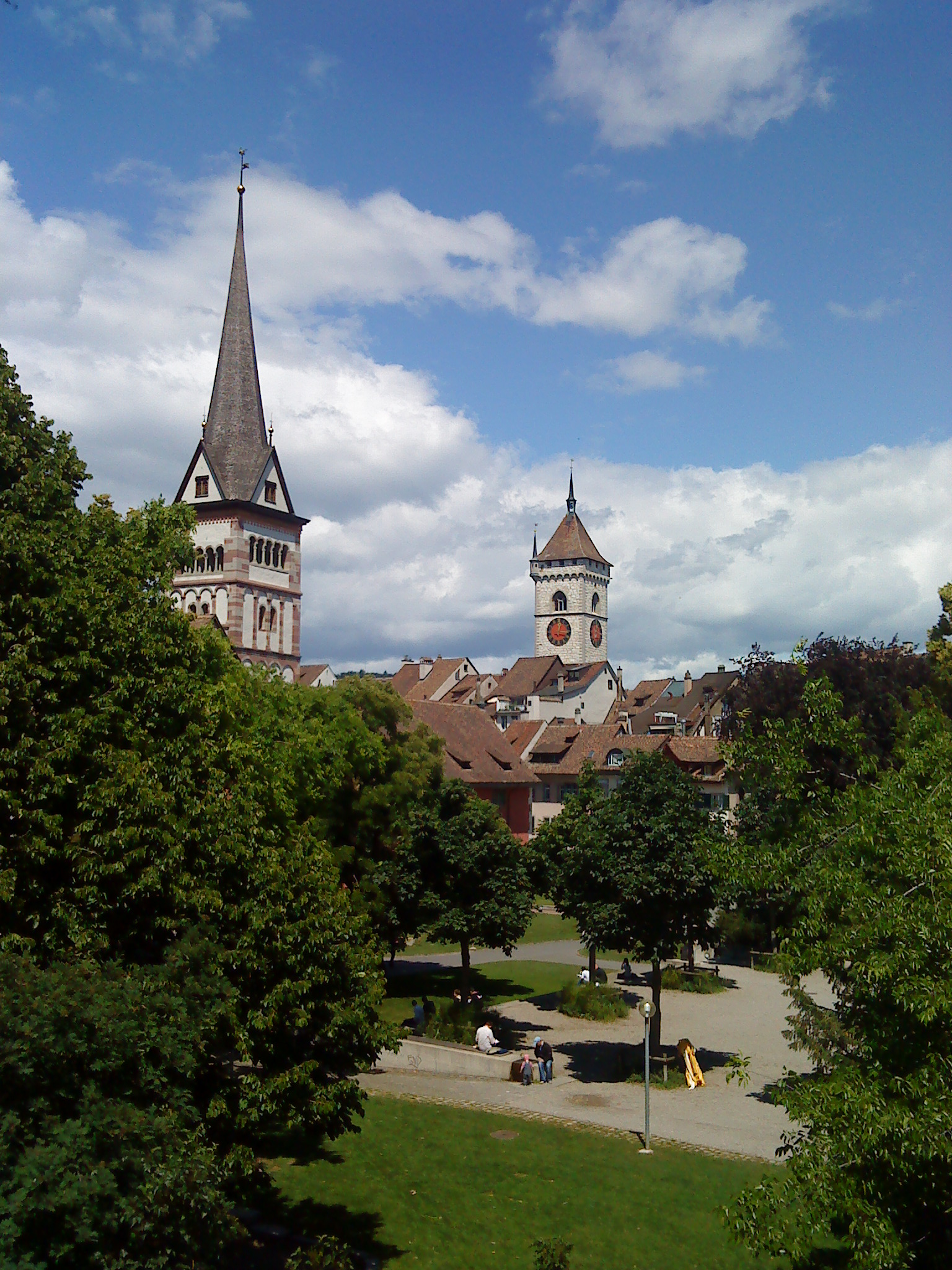 Blick auf Münster- und St. Johannturm in Schaffhausen